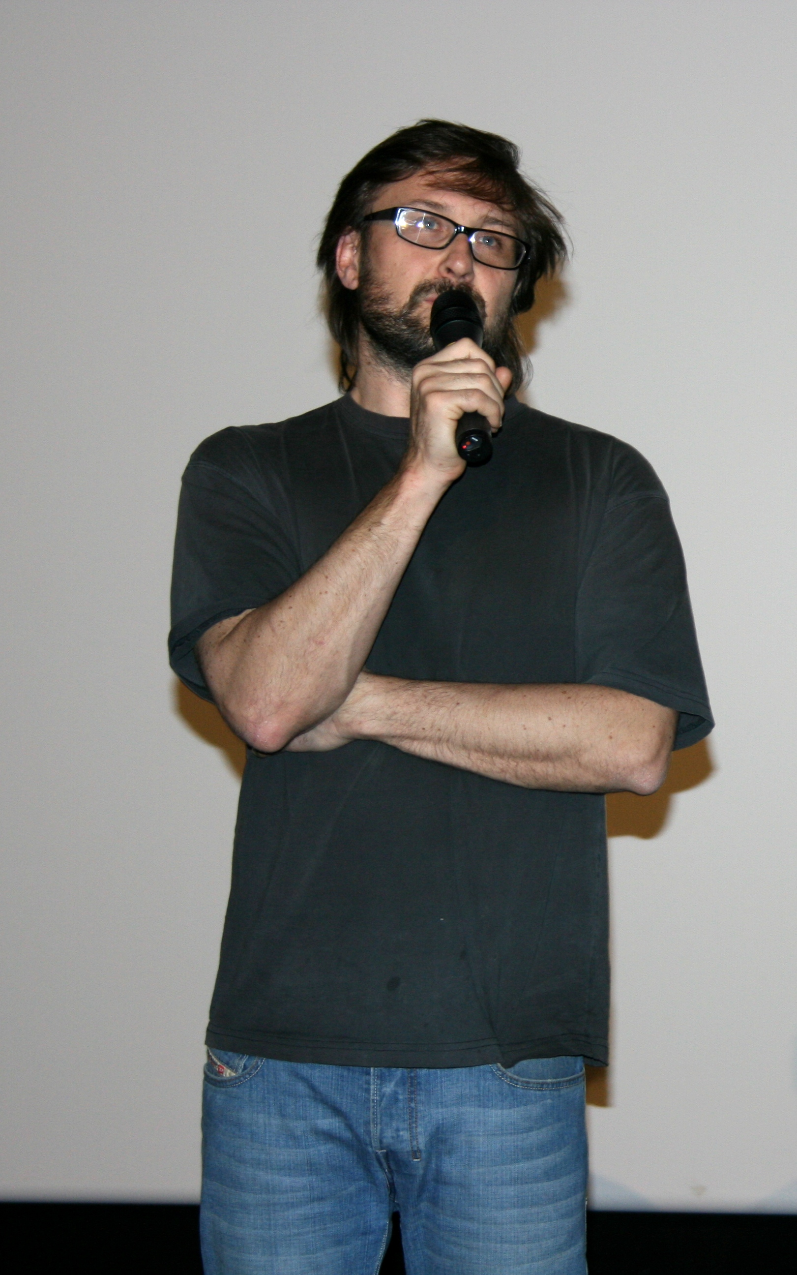 Pierre Morel à l'avant-première de Taken diffusée à l'UGC Ciné Cité Les Halles, à Paris.